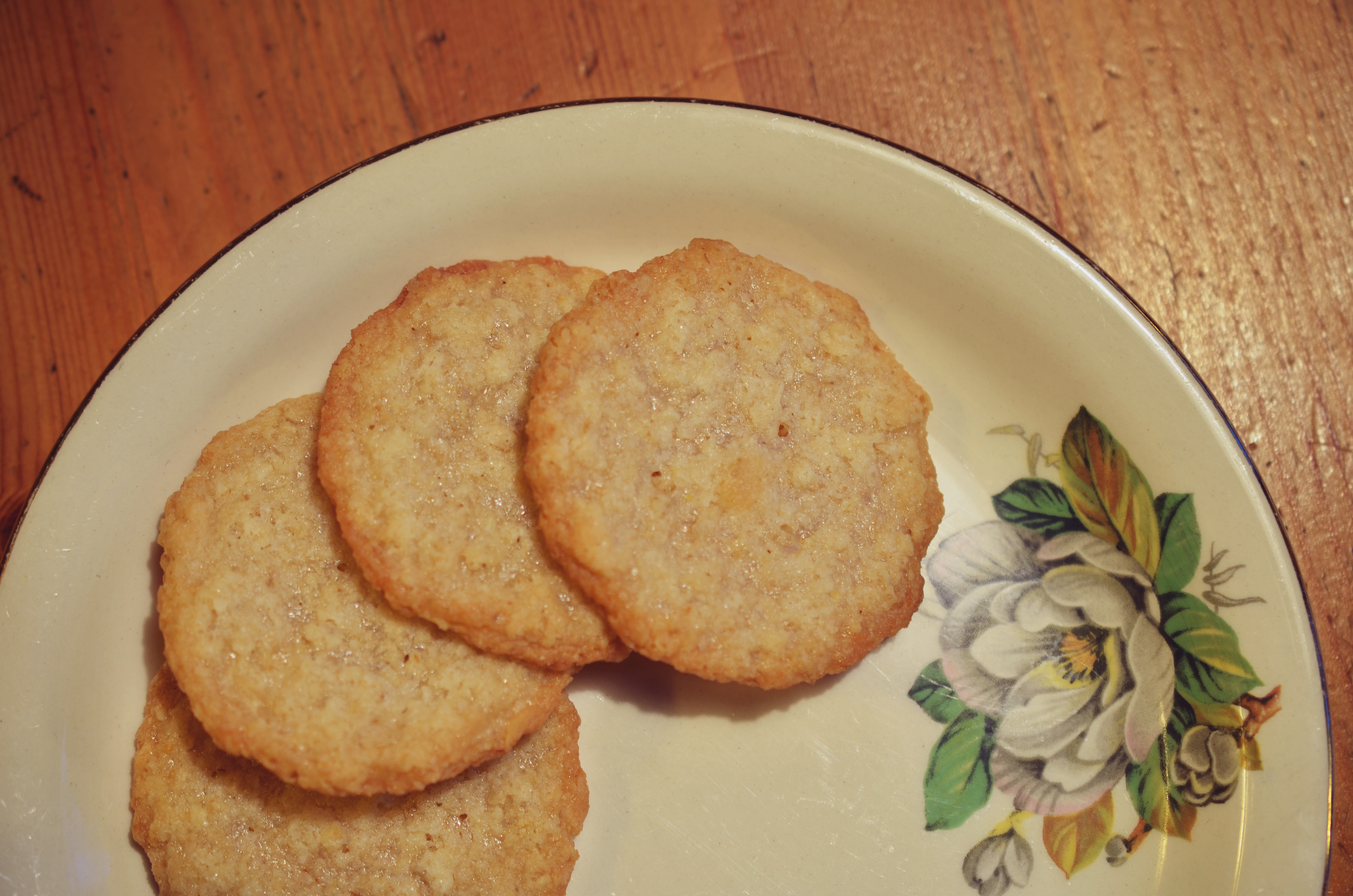 En bild på havreflarn.